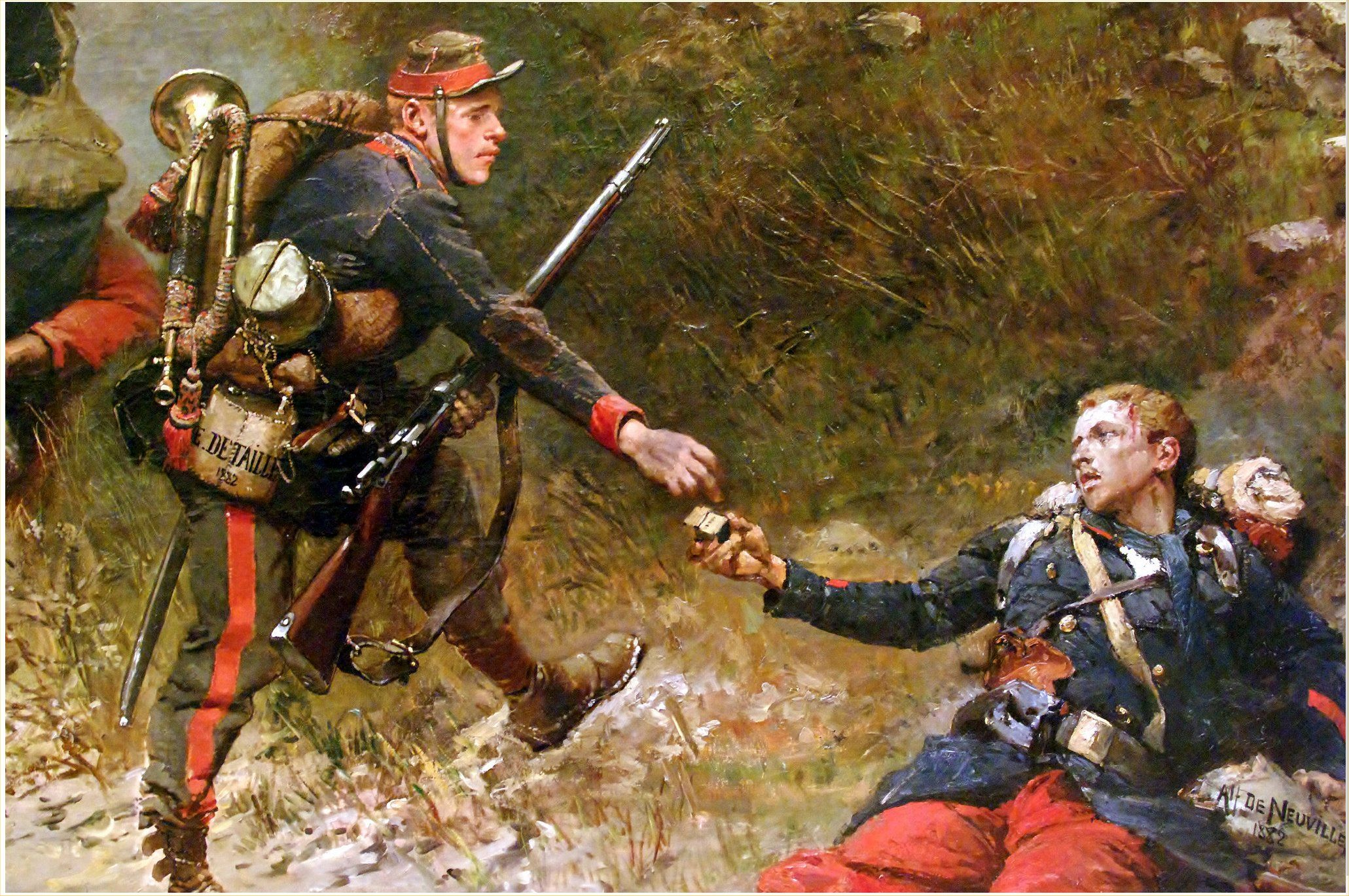 Édouard Detaille et Alphonse de Neuville, Le fond de la giberne (détail), fragment du panorama de La Bataille de Champigny.